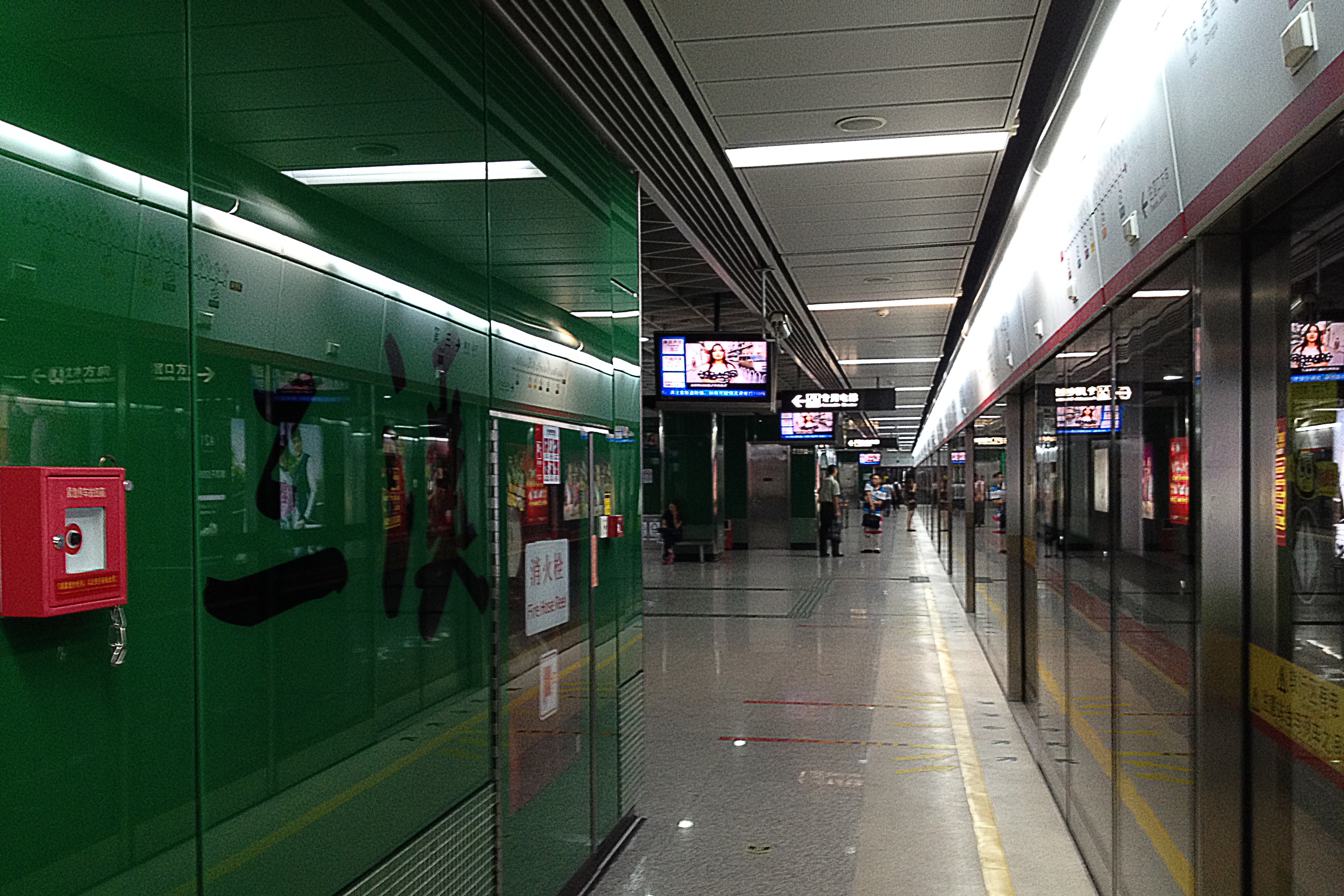 广州地铁三溪站车站月台（滘口方向）